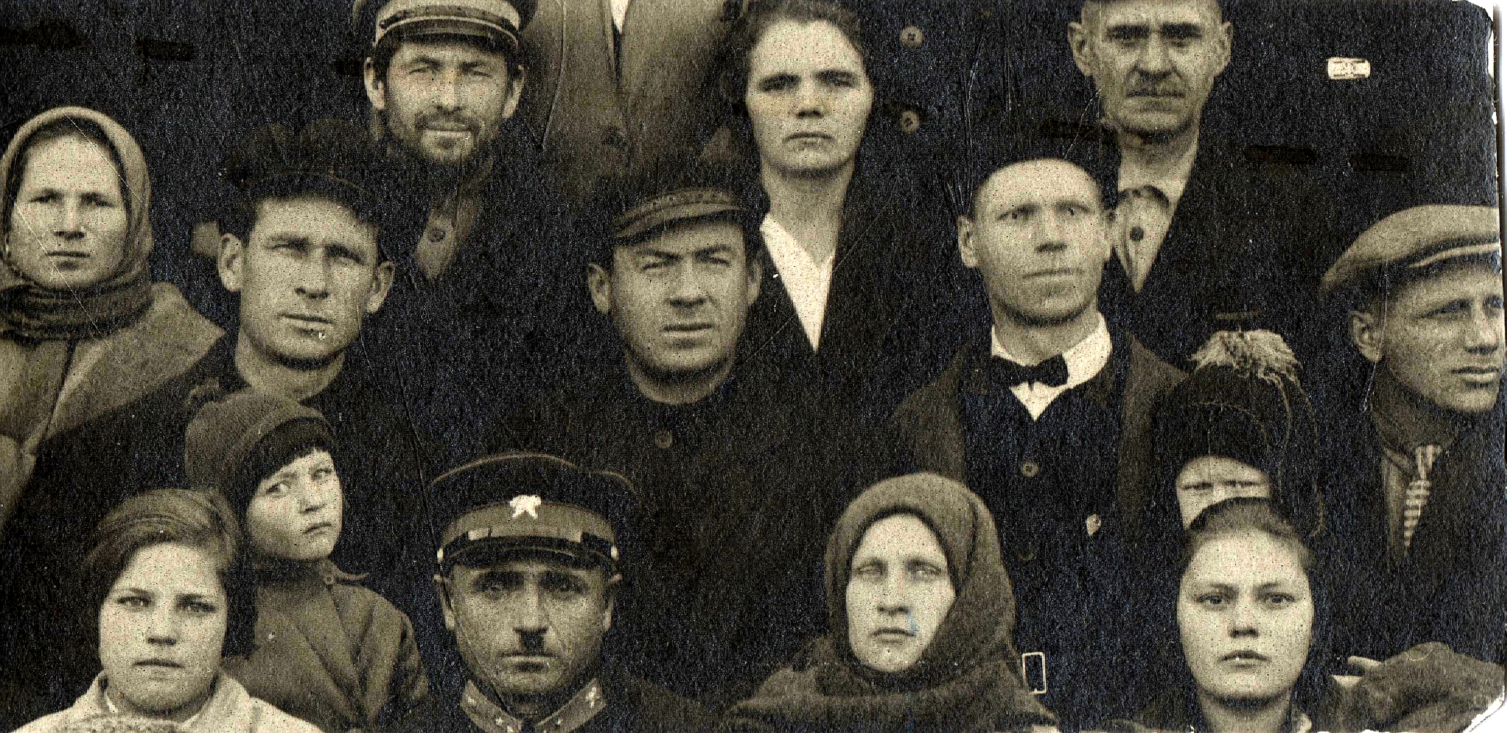 1936 год. Пермский моторостроительный завод №19 им. Сталина. На снимке Дмитрий Иванович Плотников с дочерью Кирой, Иосиф Израильевич Побережский и Аркадий Дмитриевич Швецов.